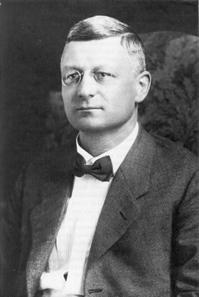 Porträtaufnahme, um 1905.